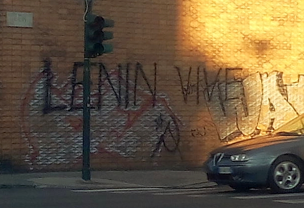 Lenin vive; graffito a Torino (Via Rieti, giugno 2016)